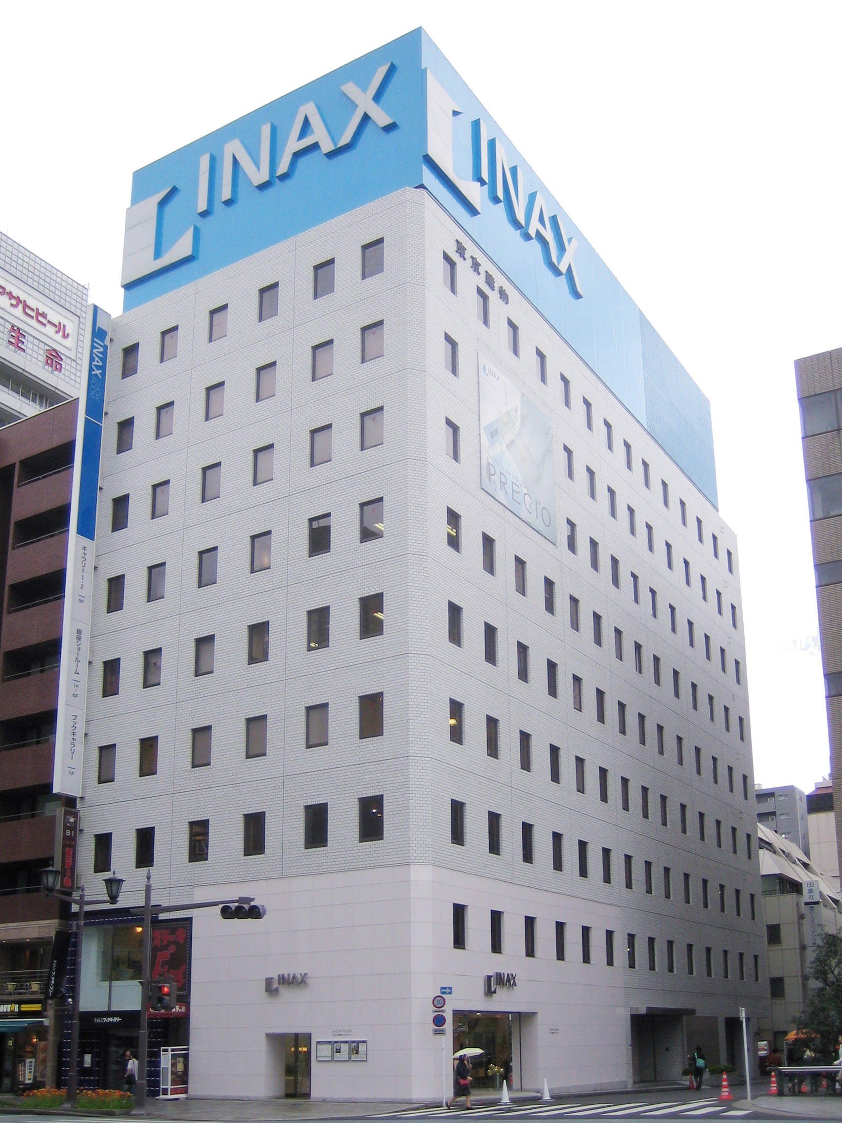 INAX (Ginza Show Room), in Chuo, Tokyo, Japan